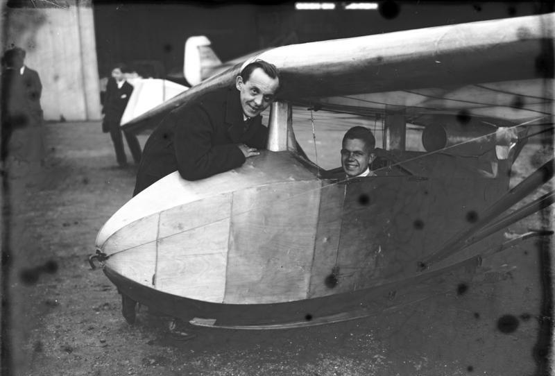 Der bekannte deutsche Segelflieger Günter Groenhoff, ist bei einem Segelflug in der Röhn tödlich abgestürzt ! Der tödlich Verunglückte Günter Groenhoff, einer der besten deutschen Segelflieger. Information added by Wikimedia users.Groenhoff in the cockpit of the Lippisch Storch V, probably in 1929. Designer Alexander Lippisch leans over the nose.